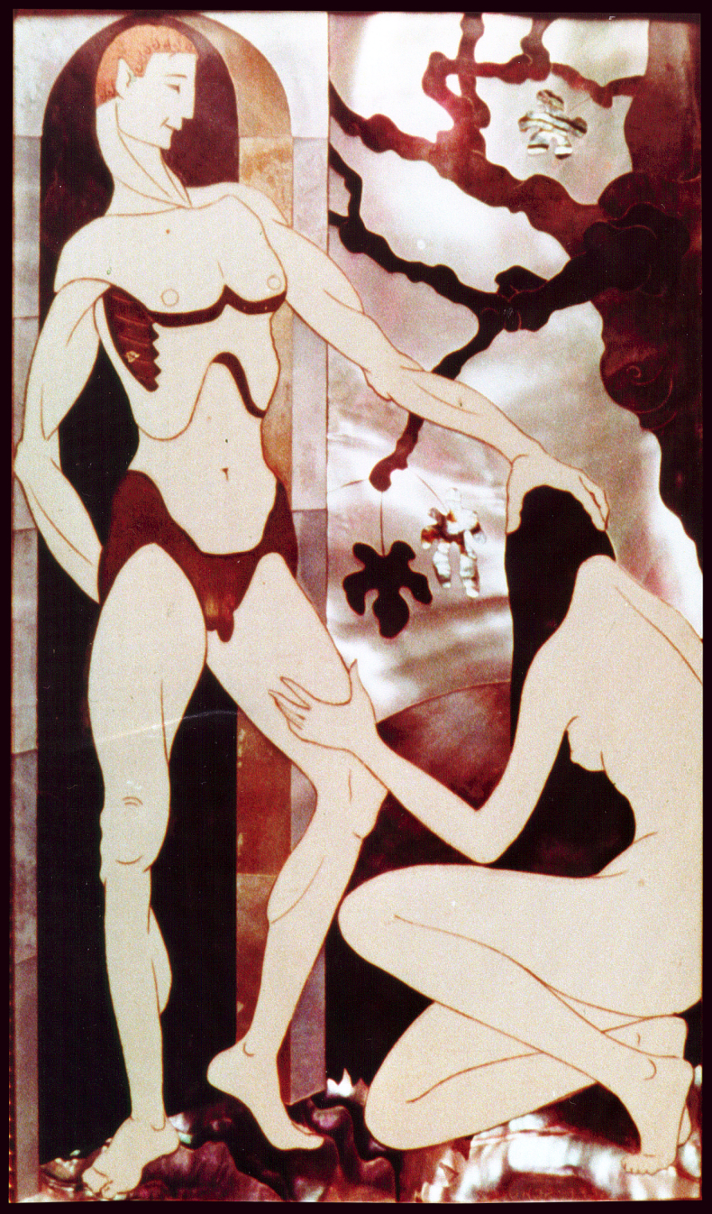 репродукция работы Льва Шульца "Мужское превосходство"